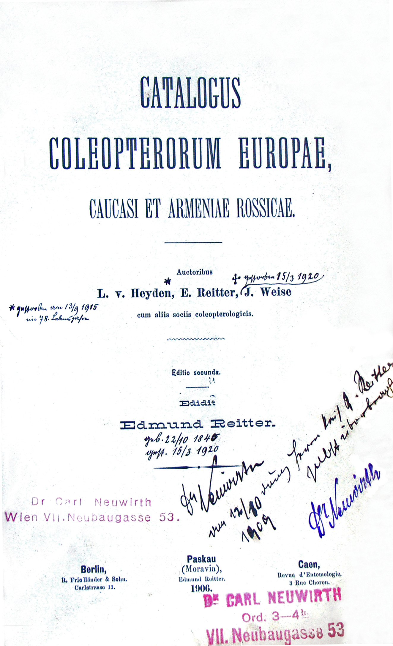 Titelblatt des Katalogs der Käfer Europas, Kaukasiens und Russisch Armeniens herausgegeben von E.Reitter 2. Auflage 1909